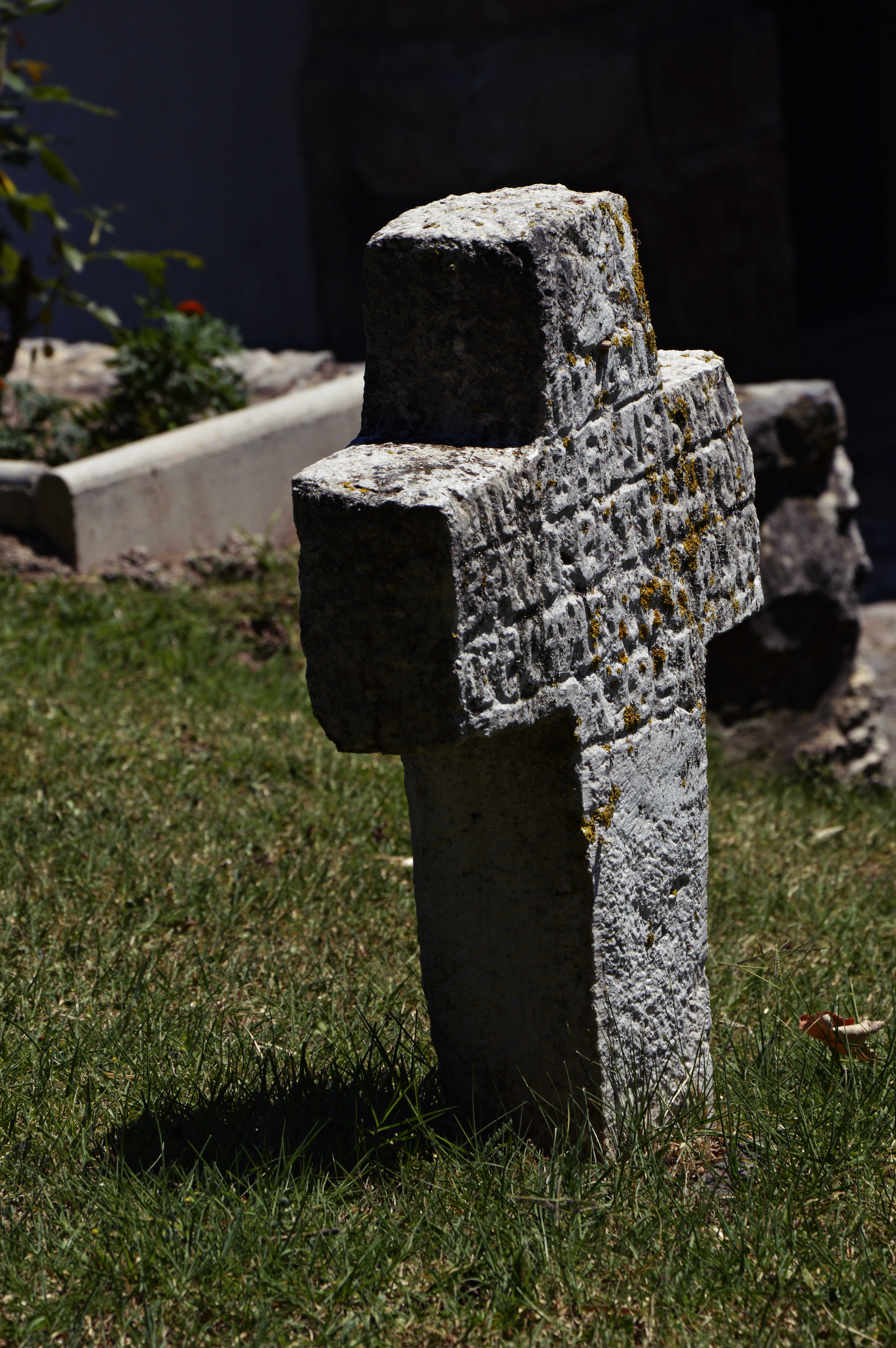 Template:Tos16rs/NKD518 Drugi primjer starog nadgrobnog spomenika smjestenog u dvoristu Crkve.